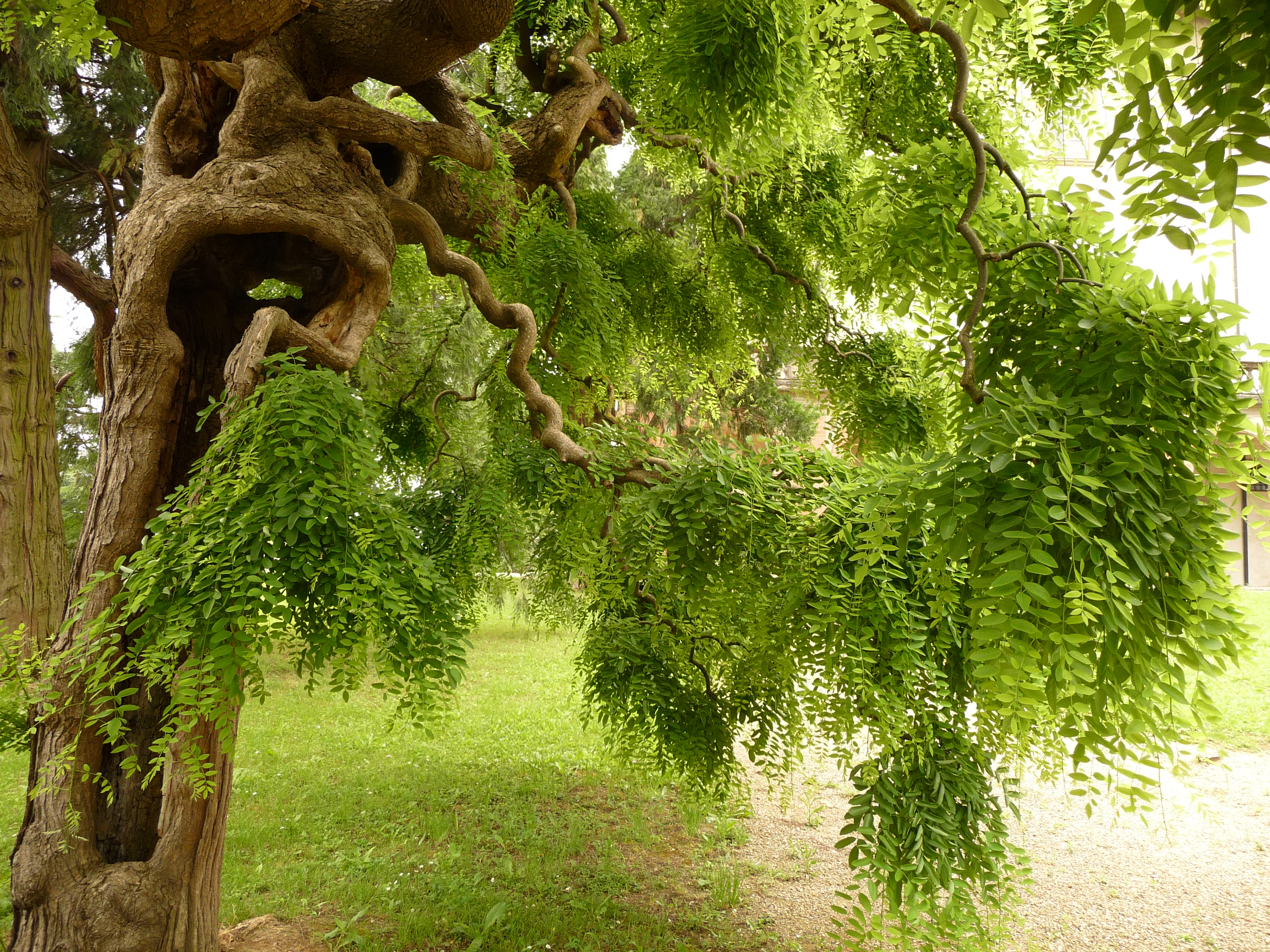 Styphnolobium japonicum 'Pendulum', Villa Medicea in Poggio a Caiano, garden